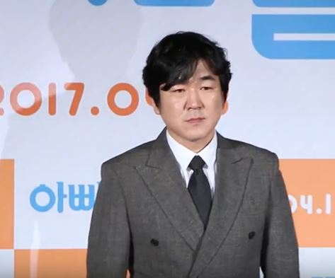 [TV10] 3월 8일 영화 '아빠는 딸' 제작보고회 현장